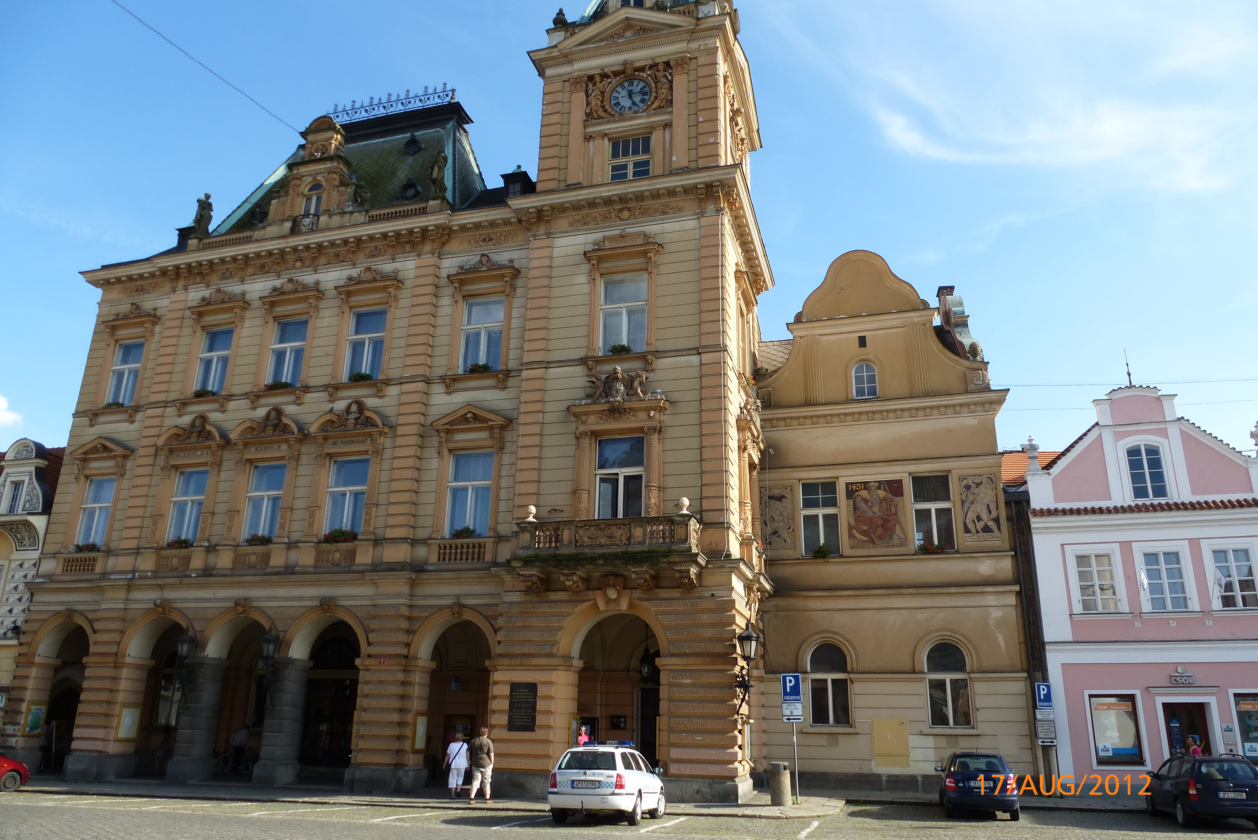 Rathaus von Domažlice